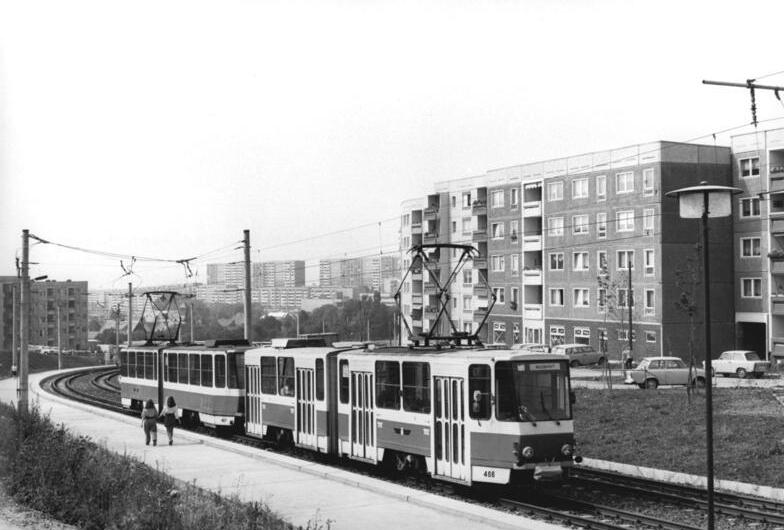 ADN-ZB-Hirndorf-15.7.1989-Erfurt: Mikoelektronik- Fast jeder fünfte Einwohner Erfurts wohnt heute am Wiesenhügel, Drosel oder Herrenberg im Südosten der Stadt. Seit 1980 entstanden hier mehr als 15.000 Wohnungen mit den dazugehörigen sozialen Einrichtungen. Mit dem Stadtteil mitgewachsen sind auch die modernen Halbleiterwerke des VEB Mikroelektronik "Karl Marx". Seit 1984 nahmen zwei Chipfabriken die Produktion auf. Information added by Wikimedia users.Max-Planck-Straße, Erfurt